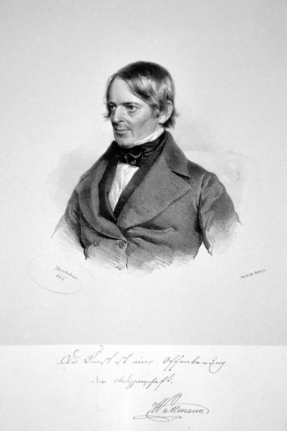 Joseph Wattmann von Maëlcamp-Beaulieu, Lithographie von Josef Kriehuber, 1844